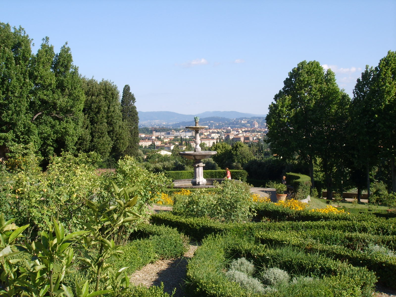 Villa La Petraia gardens, Florence, Italy